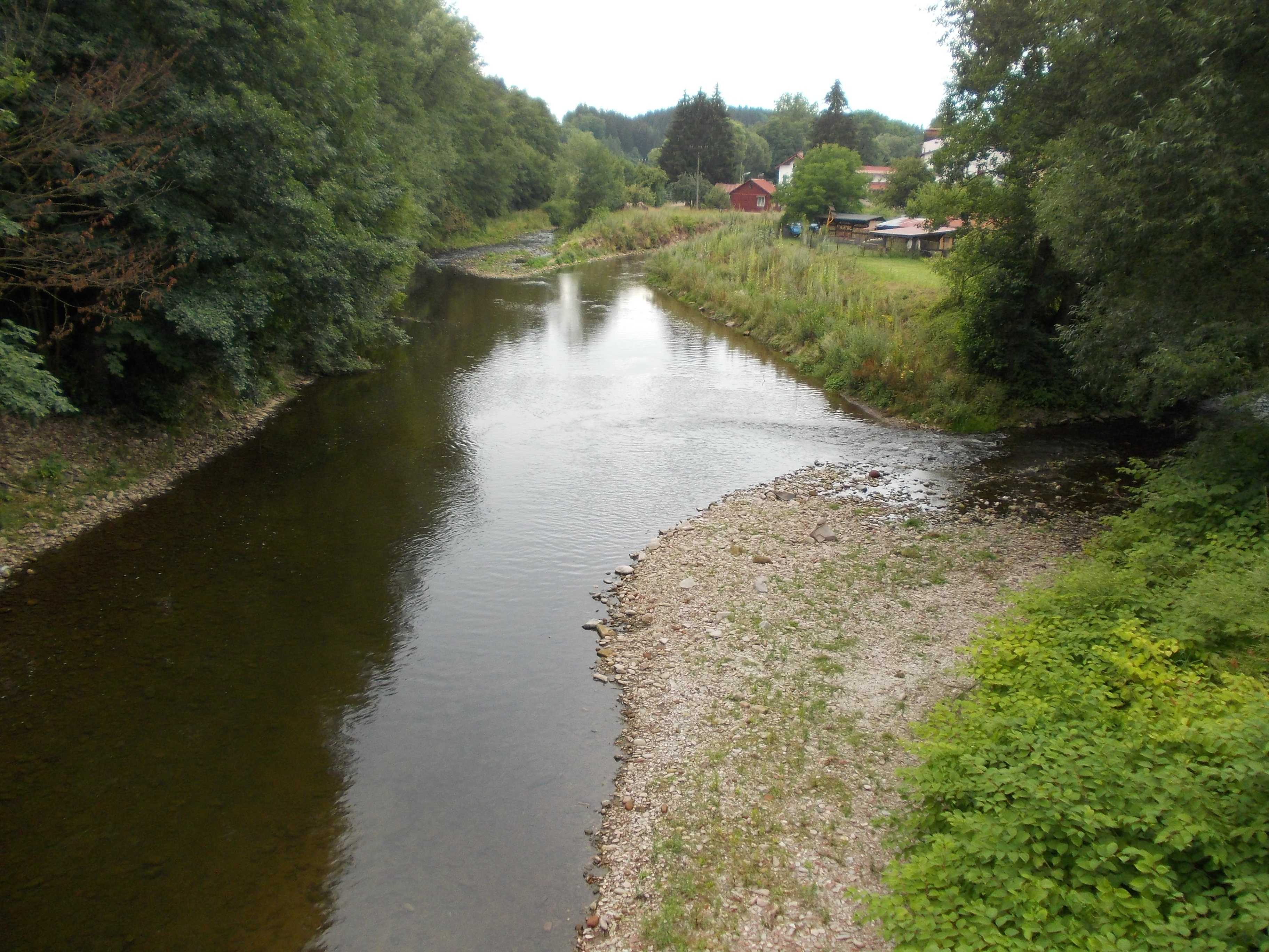 EVL Labe - Hostinné, soutok Malého Labe a Labe